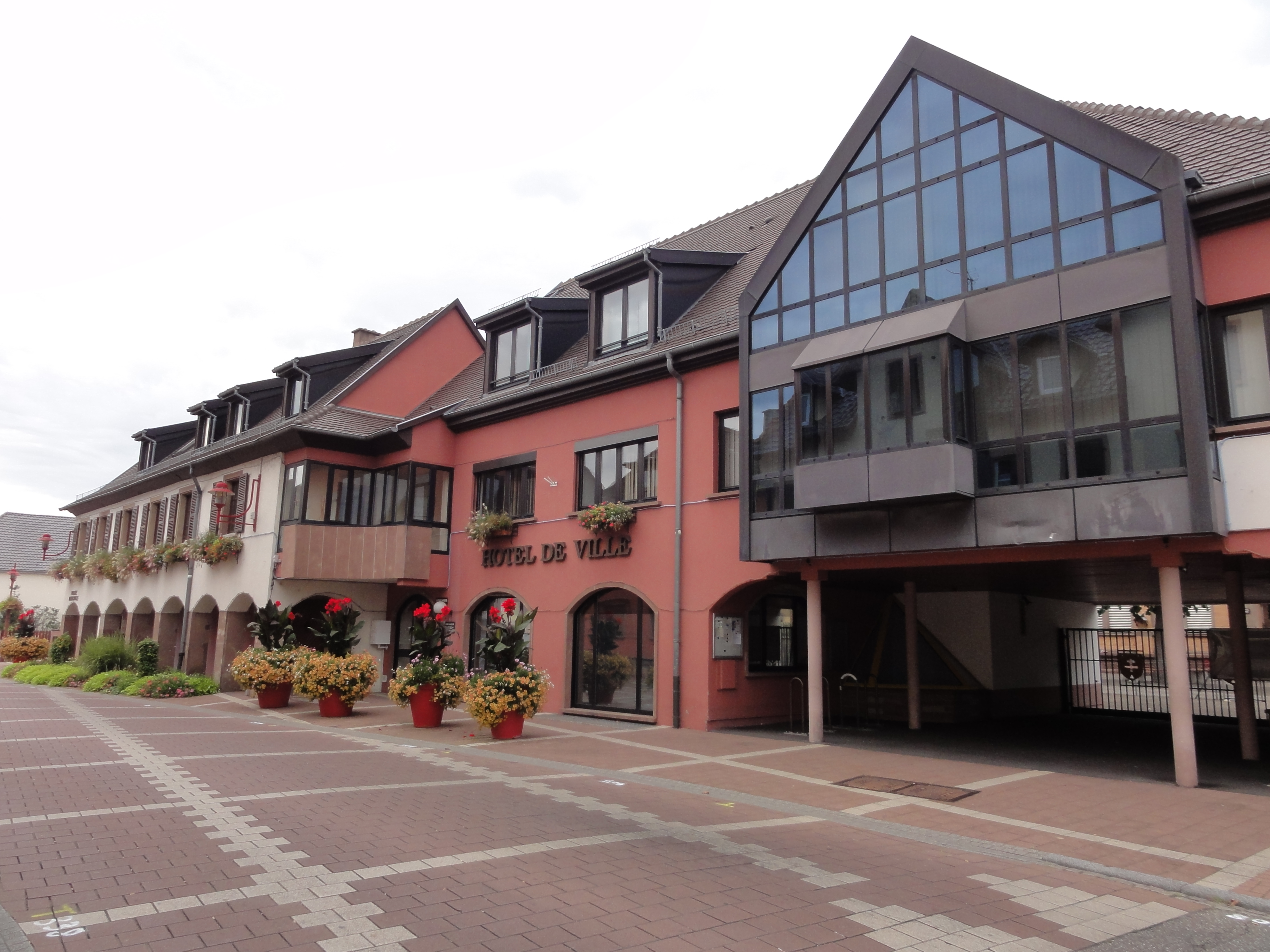 Alsace, Bas-Rhin, Eckbolsheim, Mairie, Hôtel de ville (1823-1989), 9 rue du Général-Leclerc. .